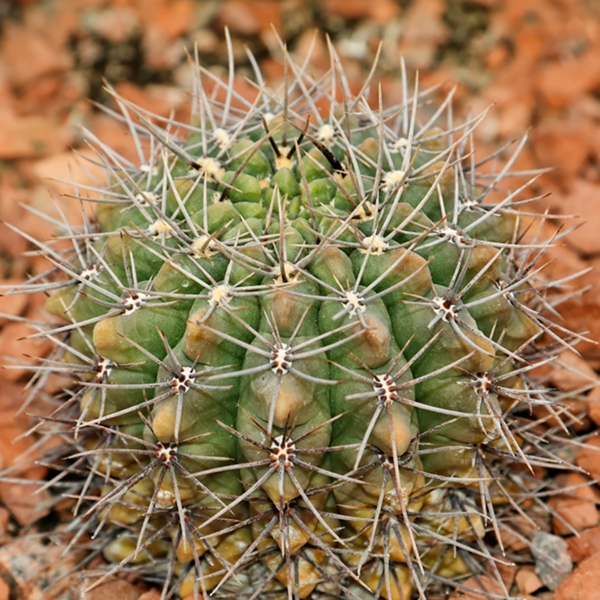 Okänd kaktus